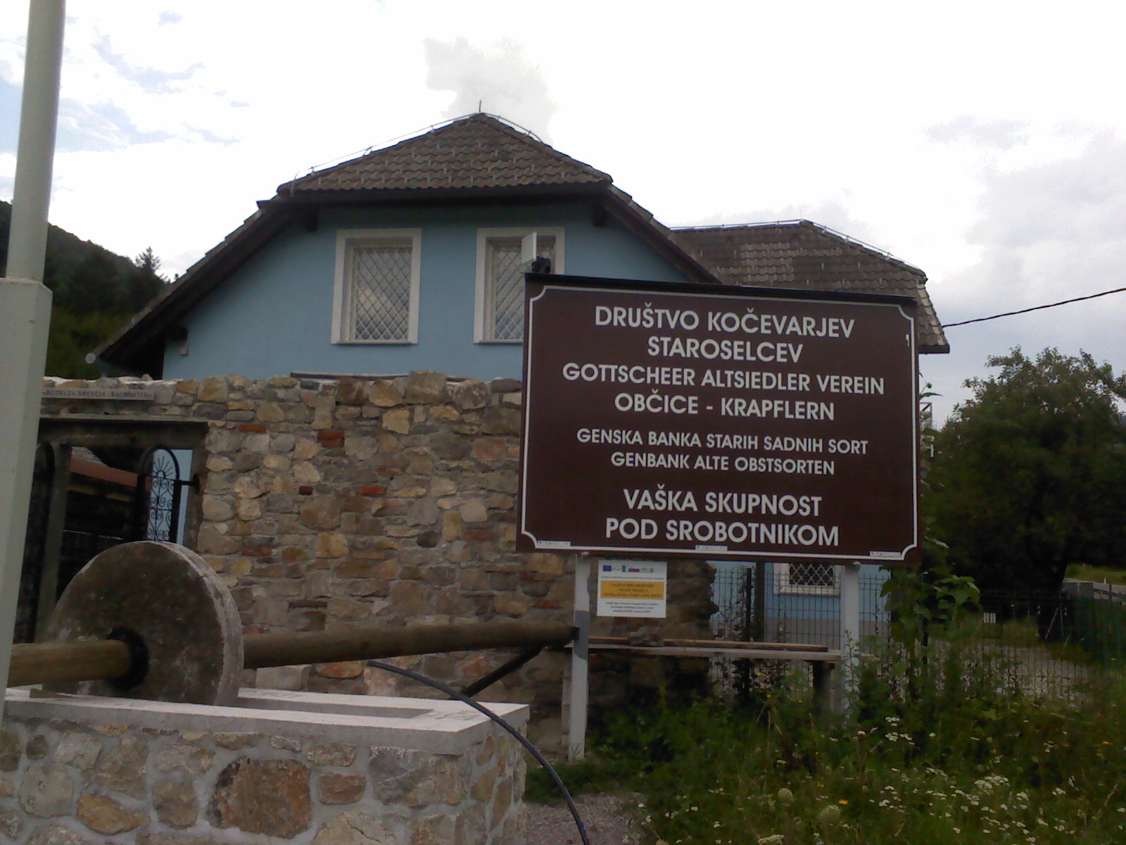 Center Društva Kočevarjev staroselcev v Občicah